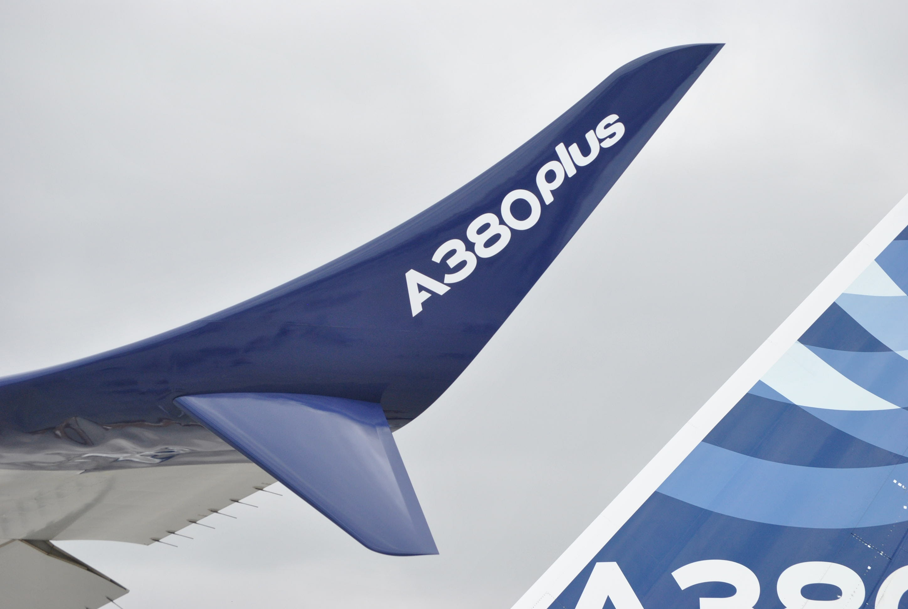 Paris Air Show 2017 Airbus A380plus